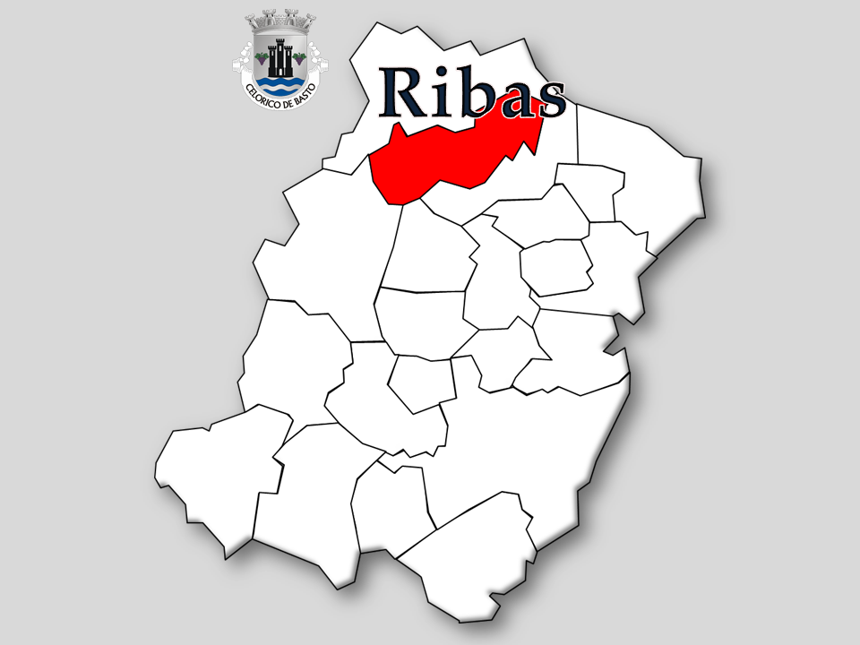 Censos 1864/2011